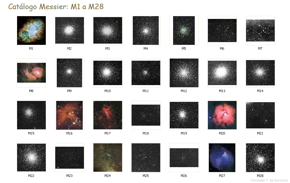 CATÁLOGO MESSIER de M1 a M28. La letra M delante del número significa Messier y el número, el objeto numerado a partir de su descubrimiento o catalogación. Otras designaciones de algunos objetos Messierː M1ː Nebulosa del Cangrejo M6ː Cúmulo de la Mariposa M7ː Cúmulo de Ptolomeo M8ː Nebulosa de la Laguna M11ː Cúmulo del Pato Salvaje M13ː Cúmulo de Hércules M15ː Cúmulo de Pegaso M16ː Nebulosa del Águila M17ː Nebulosa Omega M20ː Nebulosa Trífida M22ː Cúmulo de Sagitario M24ː Nube Estelar de Sagitario M27ː Nebulosa Dumbbell Para detalles de cada objeto entrar en Listado de Objetos Messier